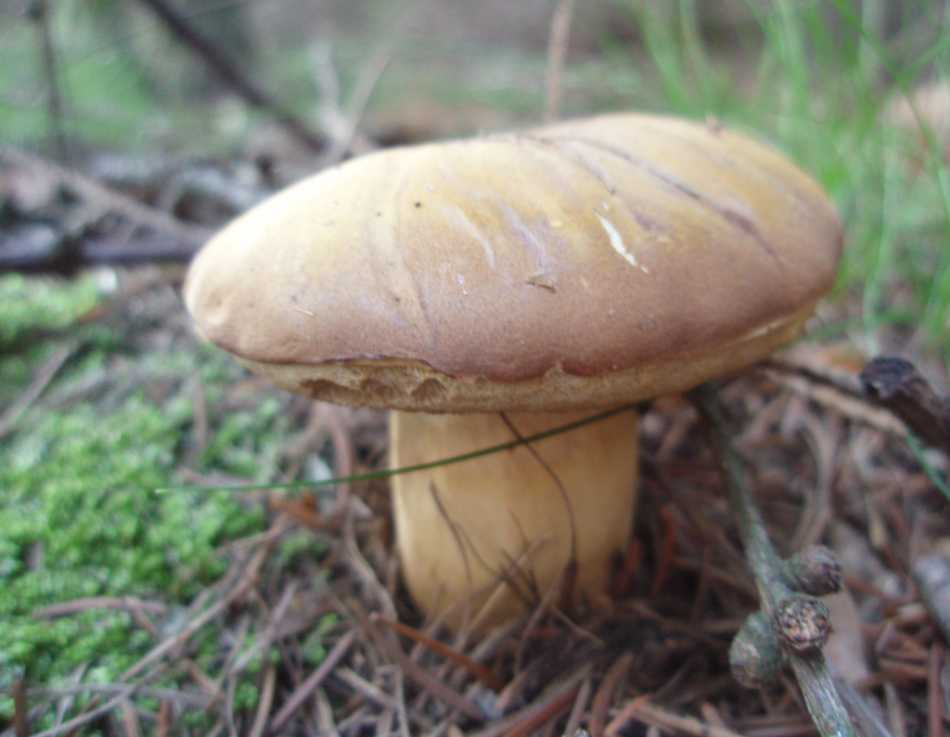 Xerocomus badius